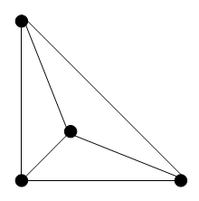 Descrição: Grafo K4 plano Fonte/Créditos: F:eita em casa para ilustrar um exemplo de grafo planar.